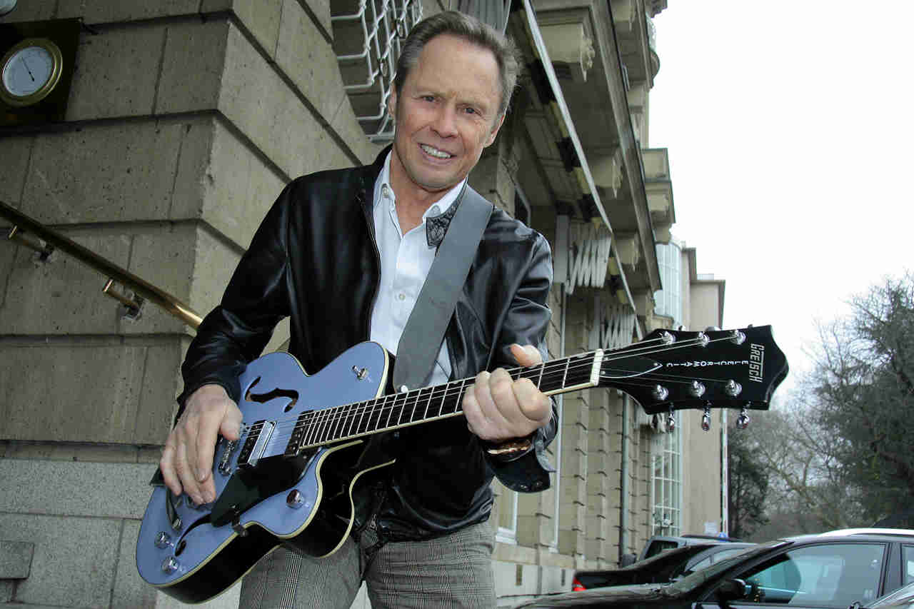 Peter Kraus. Foto: Michael Gstettenbauer